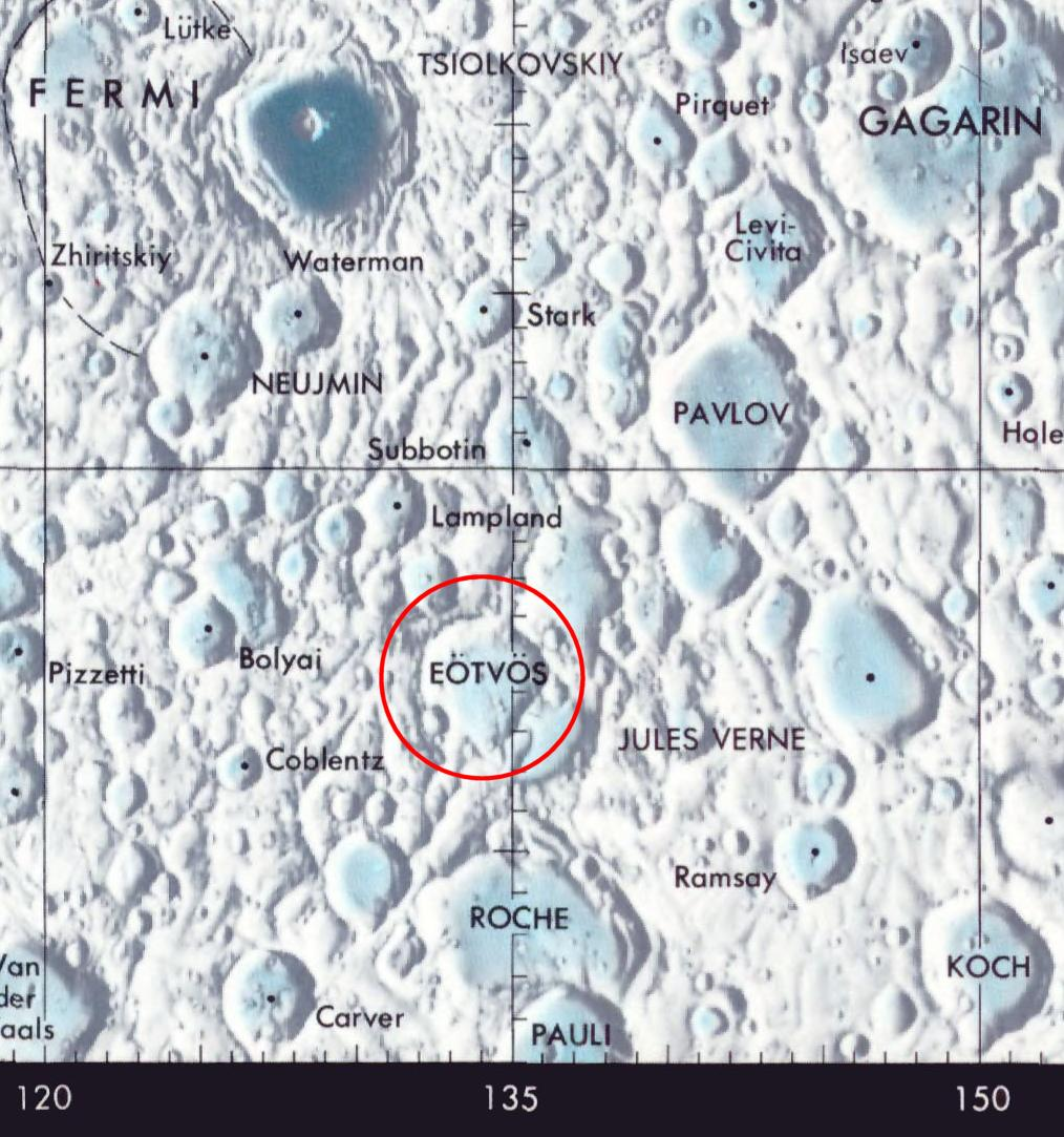 Detalle de la imagen Moonmap from Moon Map - Equatorial region 45S to 45N - LPC1 - NASA-Eötvös.jpg del cráter Eötvös